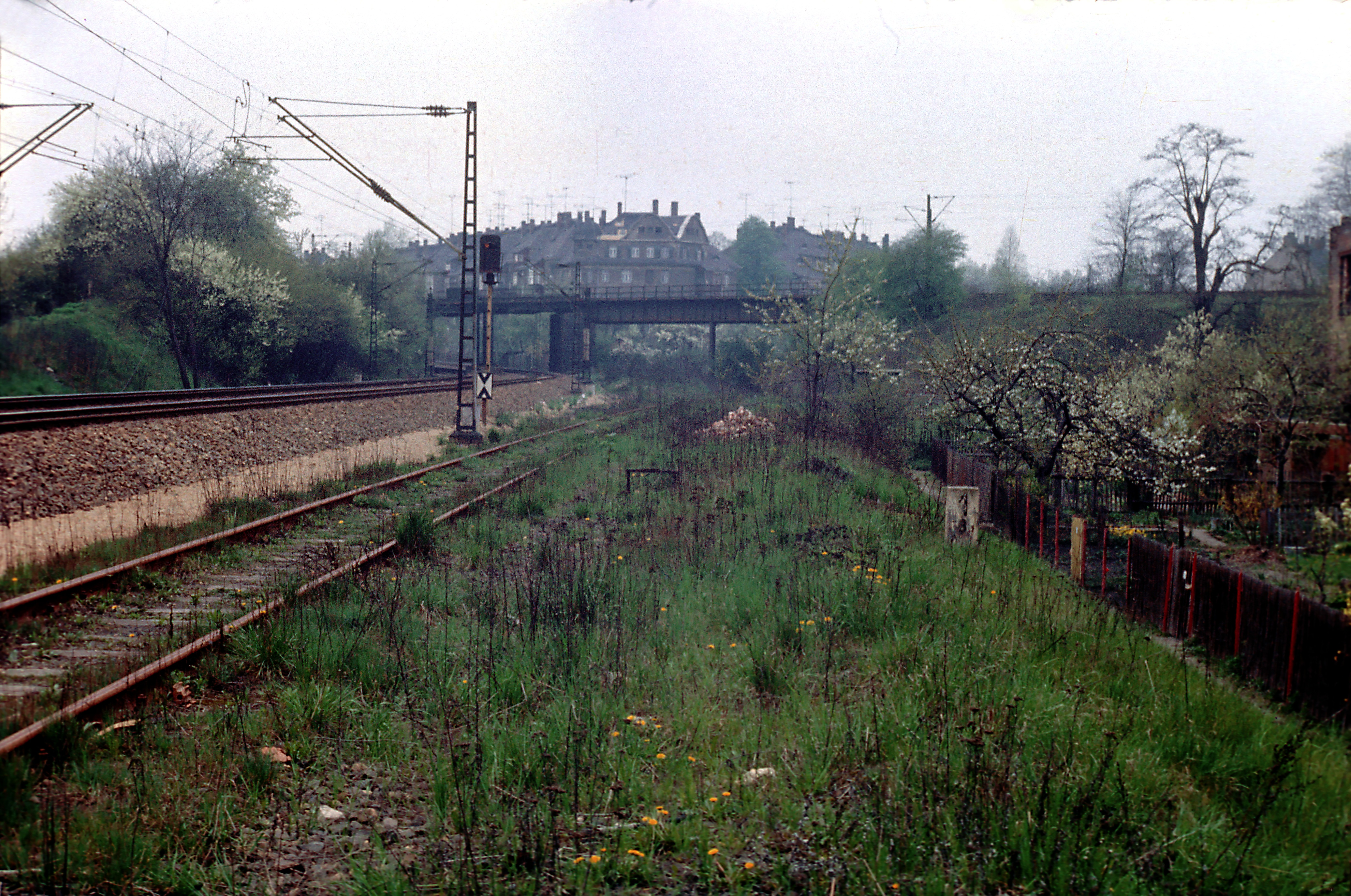 Links die Güterringgleise der Strecke ELSt (6375) Richtung Stötteritz, rechts daneben das verbliebene Gleis zum Bahnhof Leipzig Eilb Bf. Auf dem Brückenzug die »zweite Verbindungsbahn« LC, später 6361. Dass an den Güterringgleisen an dieser Stelle dreißig Jahre später der S-Bahn-Haltepunkt Anger-Crottendorf (neu) entstehen und die Verbindungsbahn stillgelegt werden könnte, war zum Aufnahmezeitpunkt nicht in Ansätzen abzusehen.